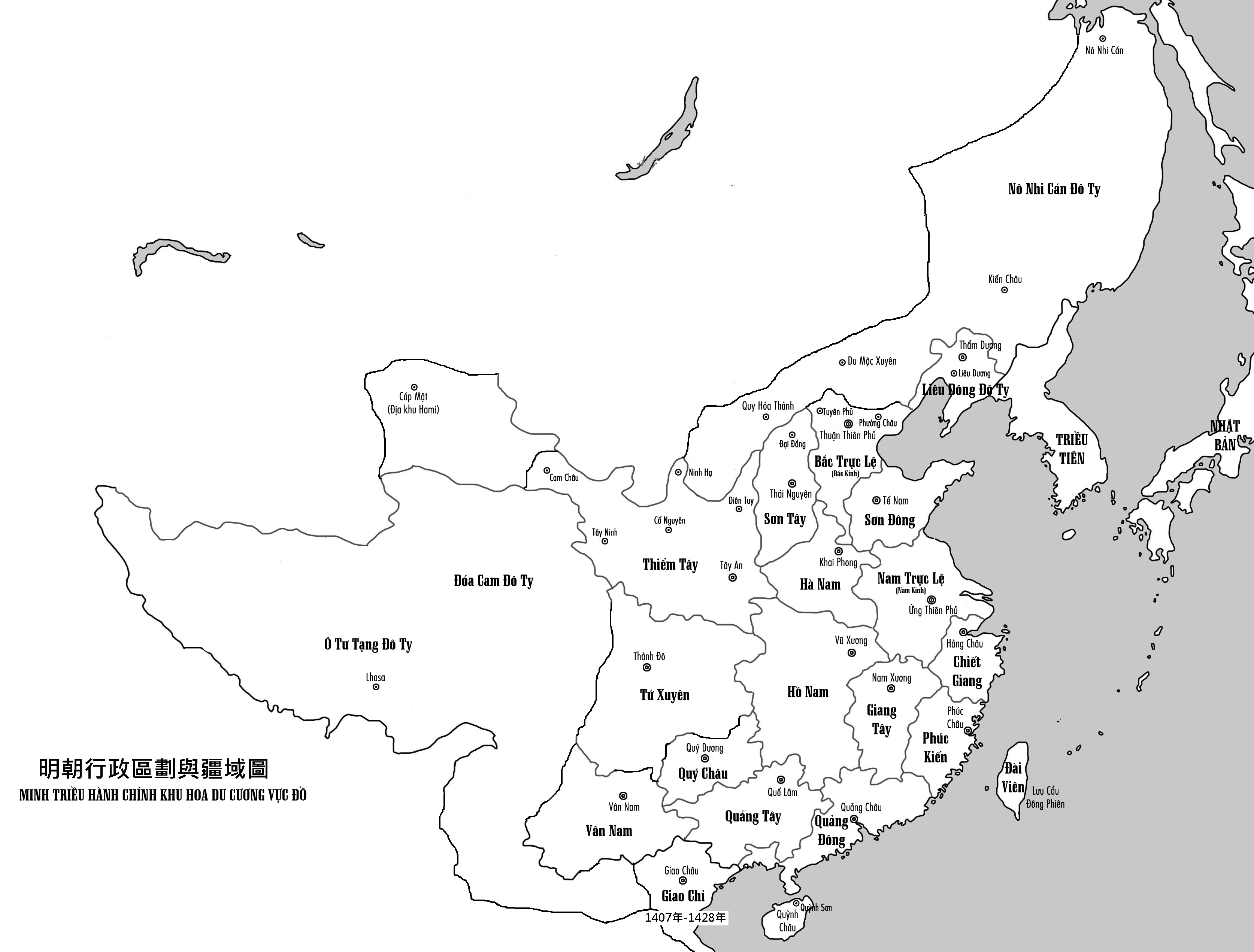 Hình ảnh được chuyển ngữ sang tiếng Việt